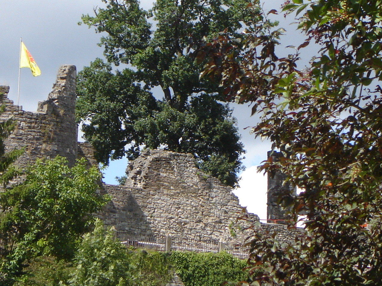 Het Gravenkasteel, Château Comtal de Rochefort